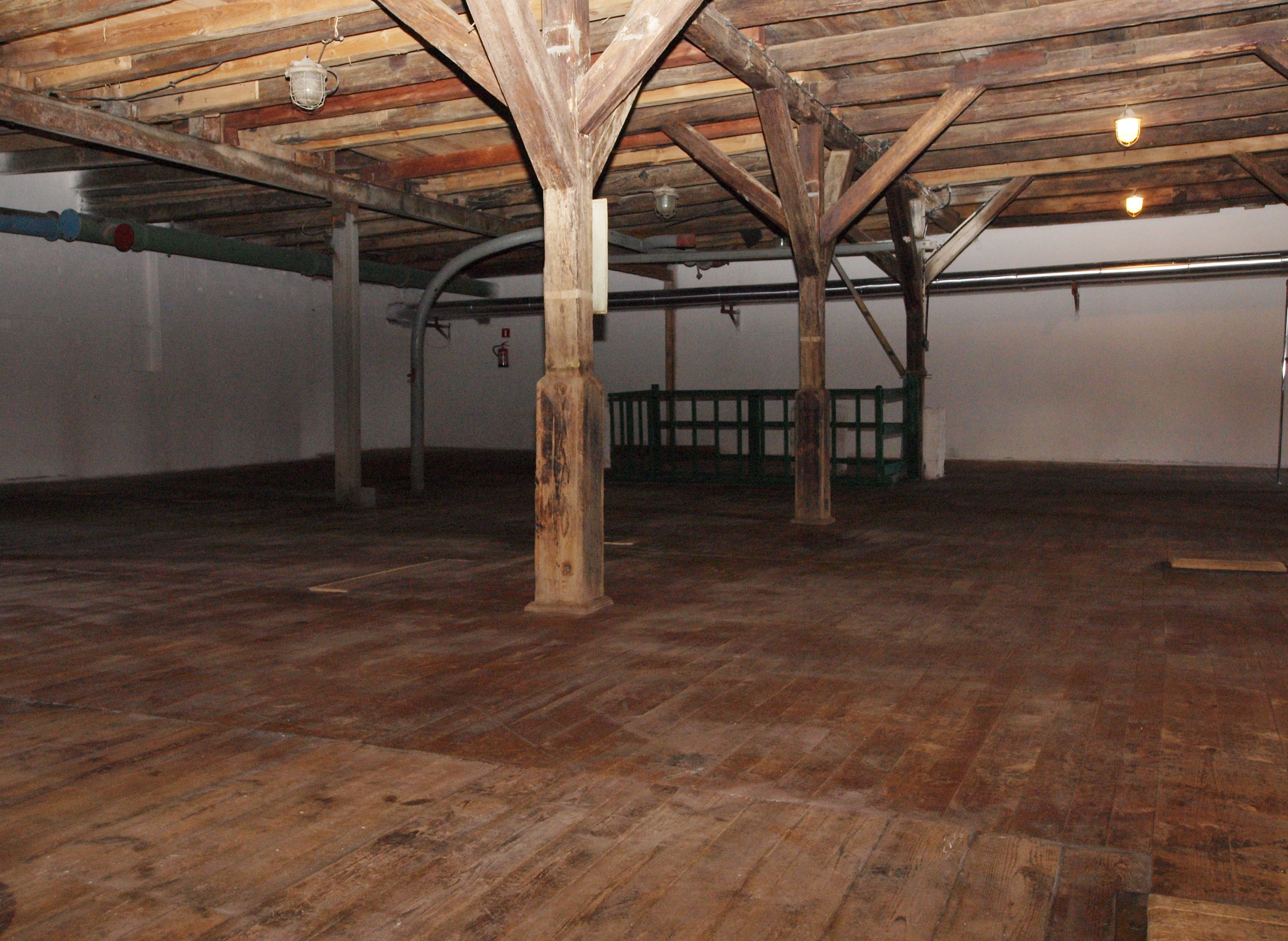 Browary Górnośląskie w Zabrzu. Nieuzywany, przedwojenny magazyn zboza.